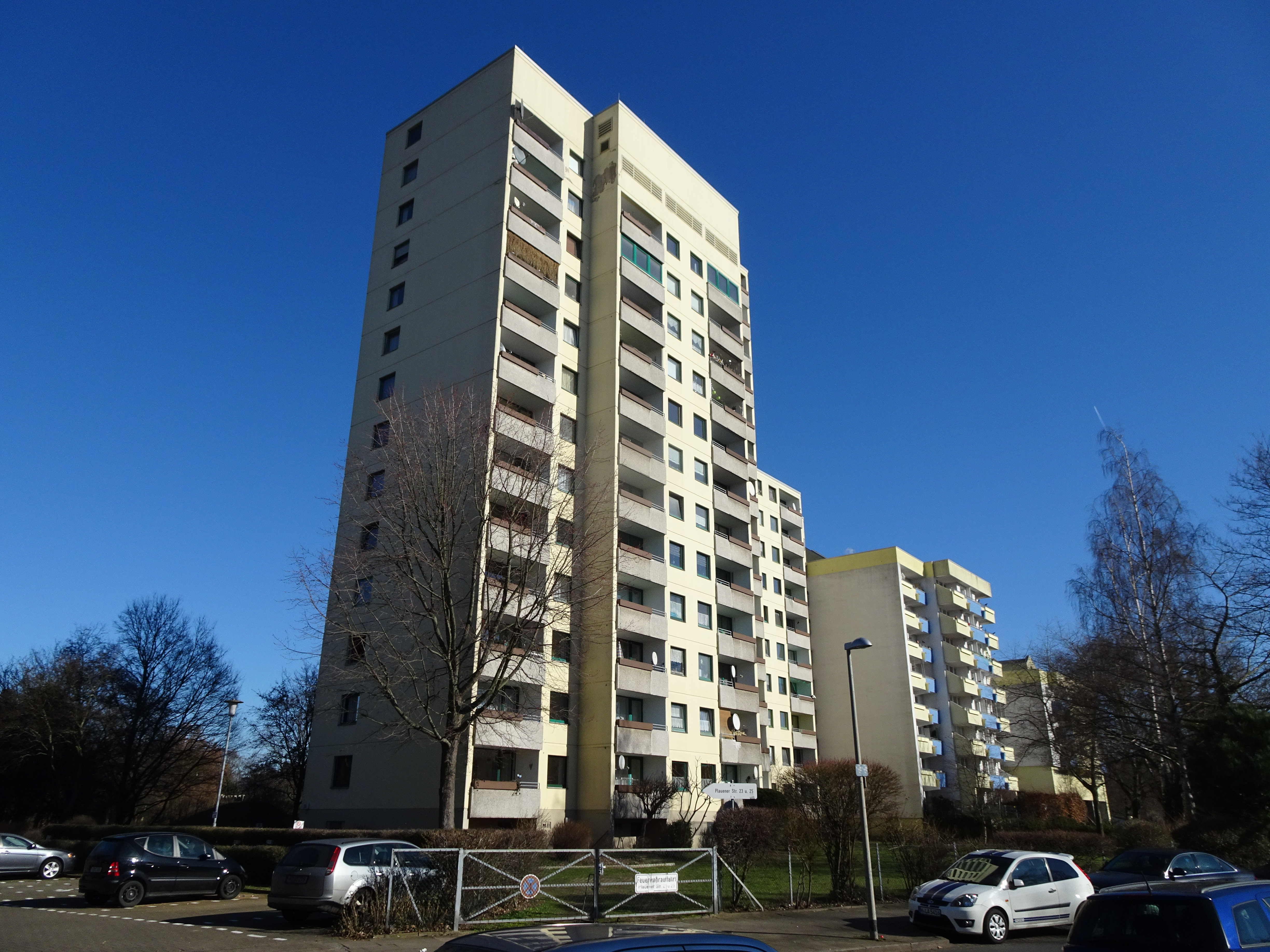 building in Hannover, Germany